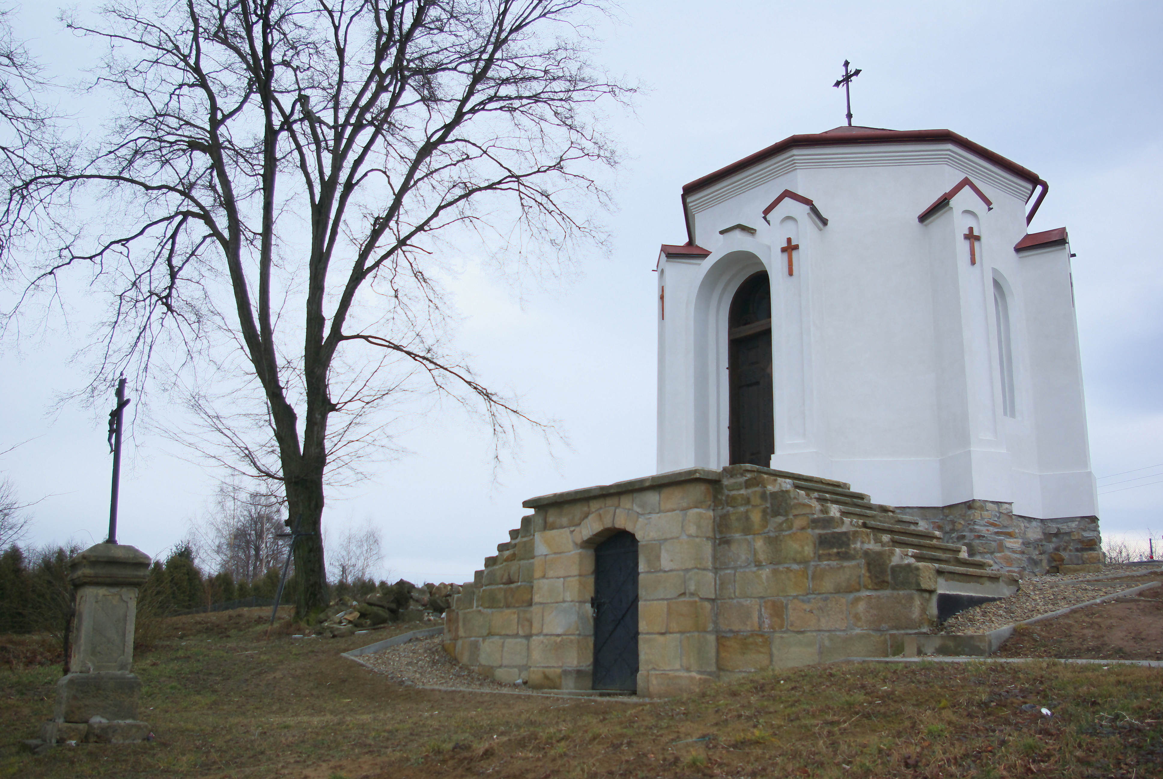 Kaplica grobowa Rylskich i Tchórznickich w Sanoku (2016).